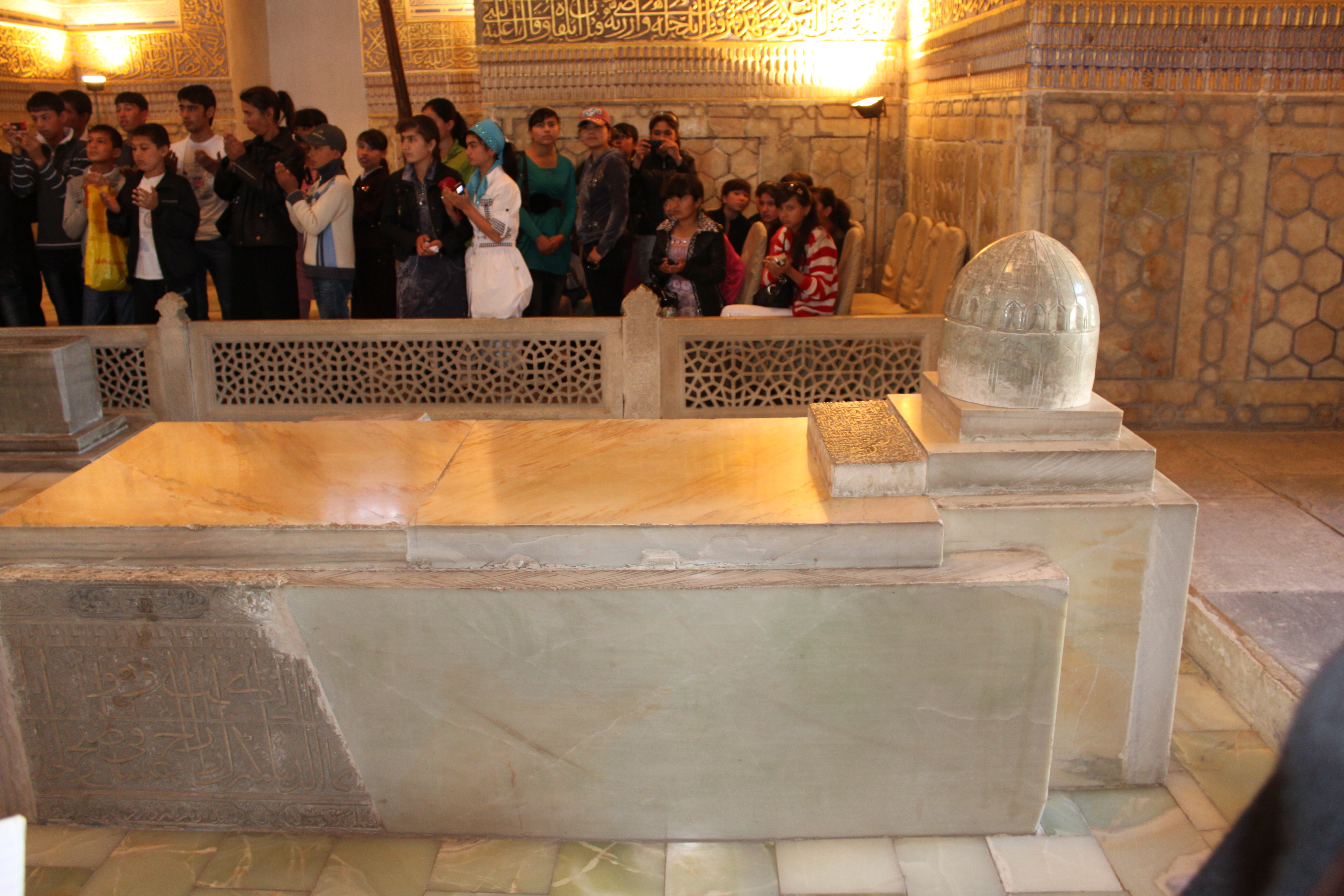 Tombeaux de Gour Emir